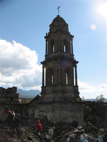 Viejo Pueblo de San Juan Parangaricutiro en la Actualidad. El viejo Pueblo de San Juan Parangaricutiro fue abandonado a causa del nacimiento del Volcán Paricutín en 1943. solo quedando de este, parte de la iglesia.